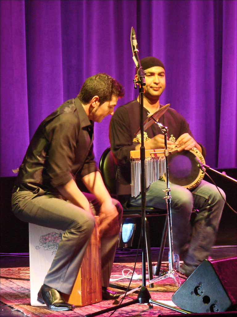 Les percussionnistes du groupe de Gani Mirzo (leurs noms ne figurent pas sur le programme) Au premier plan, percussionniste jouant dans le style flamenco (Cajón, cymbale, petites cloches tubulaires) et au deuxième plan dans le style arabe (darbouka et bendir) DIALOGUE MUSICAL : LE FLAMENCO ET L'ORIENT avec Gani Mirzo et Neyla Ben Bey En concert à l'auditorium de l'Institut du Monde arabe vendredi 13 avril 2012 Article Wikipedia sur le Cajon A l'auditorium de l'Institut du Monde Arabe, le groupe de Gani Mirzo a donné un excellent concert, proposant une musique originale et fusionnelle, d'inspiration clairement orientale, menée par le luthiste et par la chanteuse mais intégrant de multiples formes du flamenco (guitare, percussion) et même du jazz. Ce groupe mixte dont les noms des musiciens ne figurent pas sur le programme, ni sur le site de l'IMA en dehors de ceux des deux leaders (pourquoi un tel oubli ?) associe de remarquables musiciens espagnols de flamenco à des musiciens arabes maîtrisant parfaitement leur art. Le guitariste et le violoncelliste méritent une mention particulière car ils parviennent à adapter leurs jeux aux contraintes esthétiques de la musique arabe en maintenant une cohérence harmonique et rythmique de l'ensemble. On peut en dire autant des deux percussionnistes virtuoses qui ont assuré une rythmique impeccable tout en se complétant et en se mettant en valeur mutuellement. Après un début de concert moins convaincant, le groupe a fait la preuve de son expérience du travail collectif, de sa qualité artistique et surtout de la pertinence de sa démarche esthétique. le site officiel de Gani Mirzo